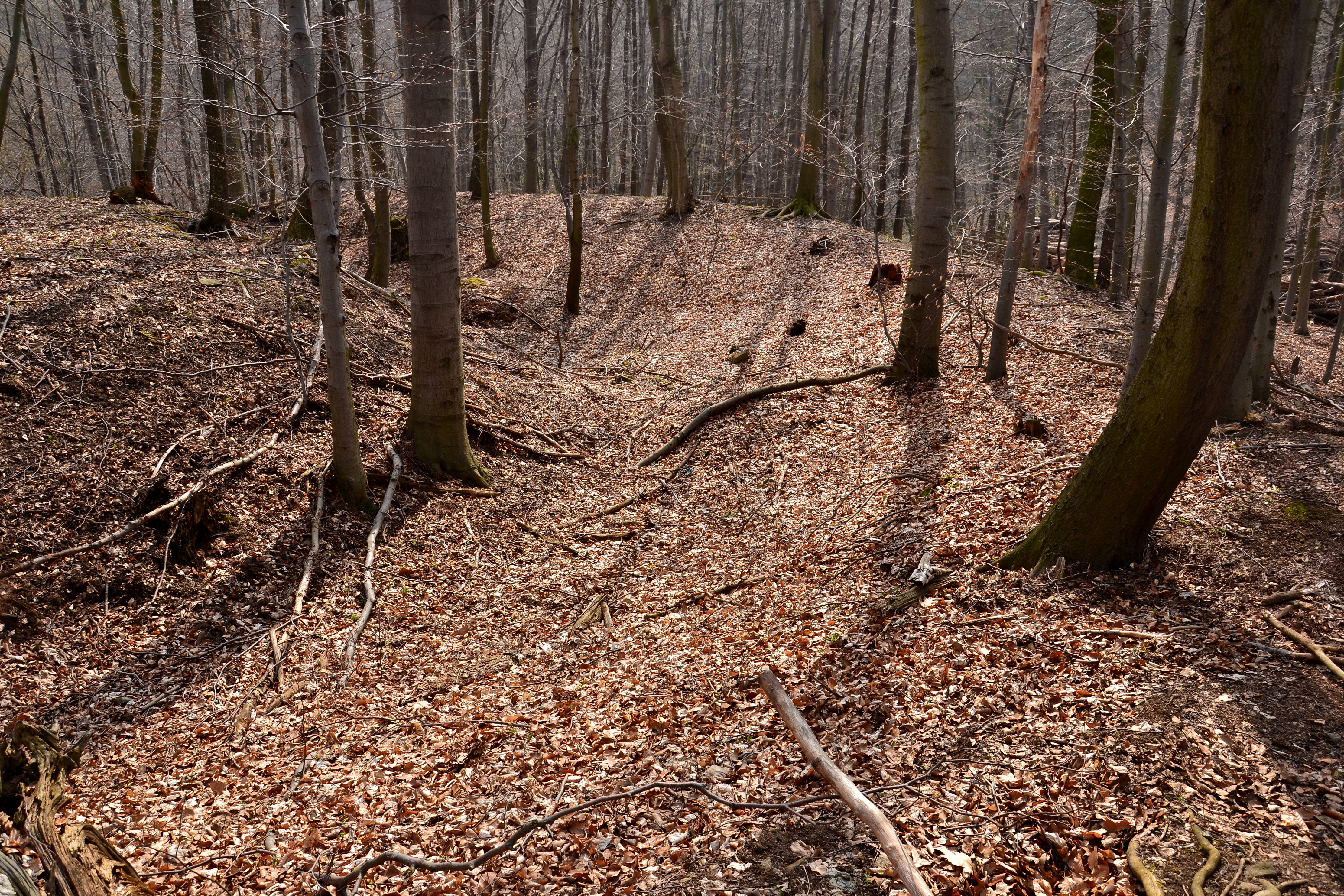 Val a příkop okolo největšího pahorku